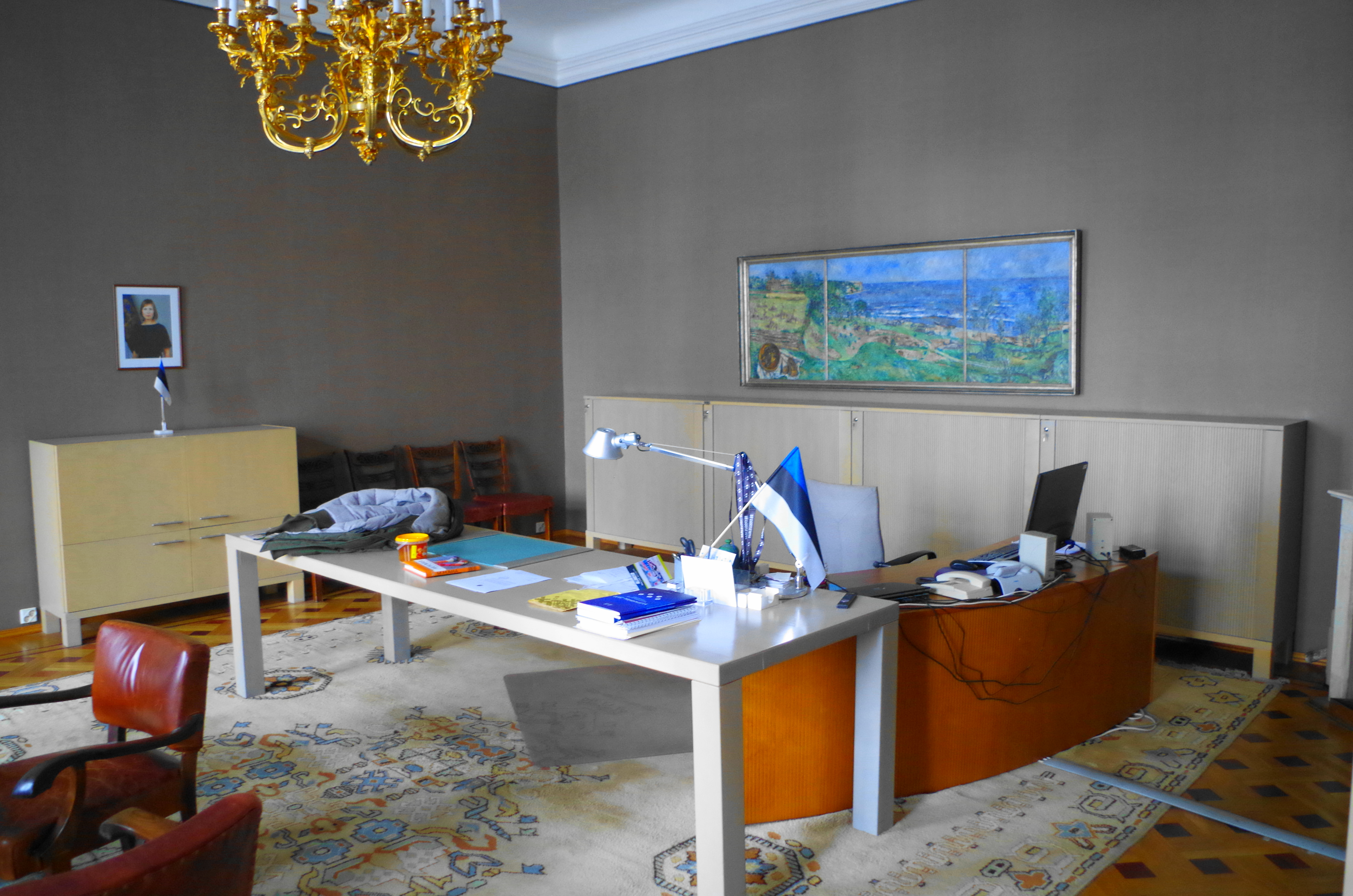 Riigikogu esimehe kabinet Toompea lossi Riigikogu hoones